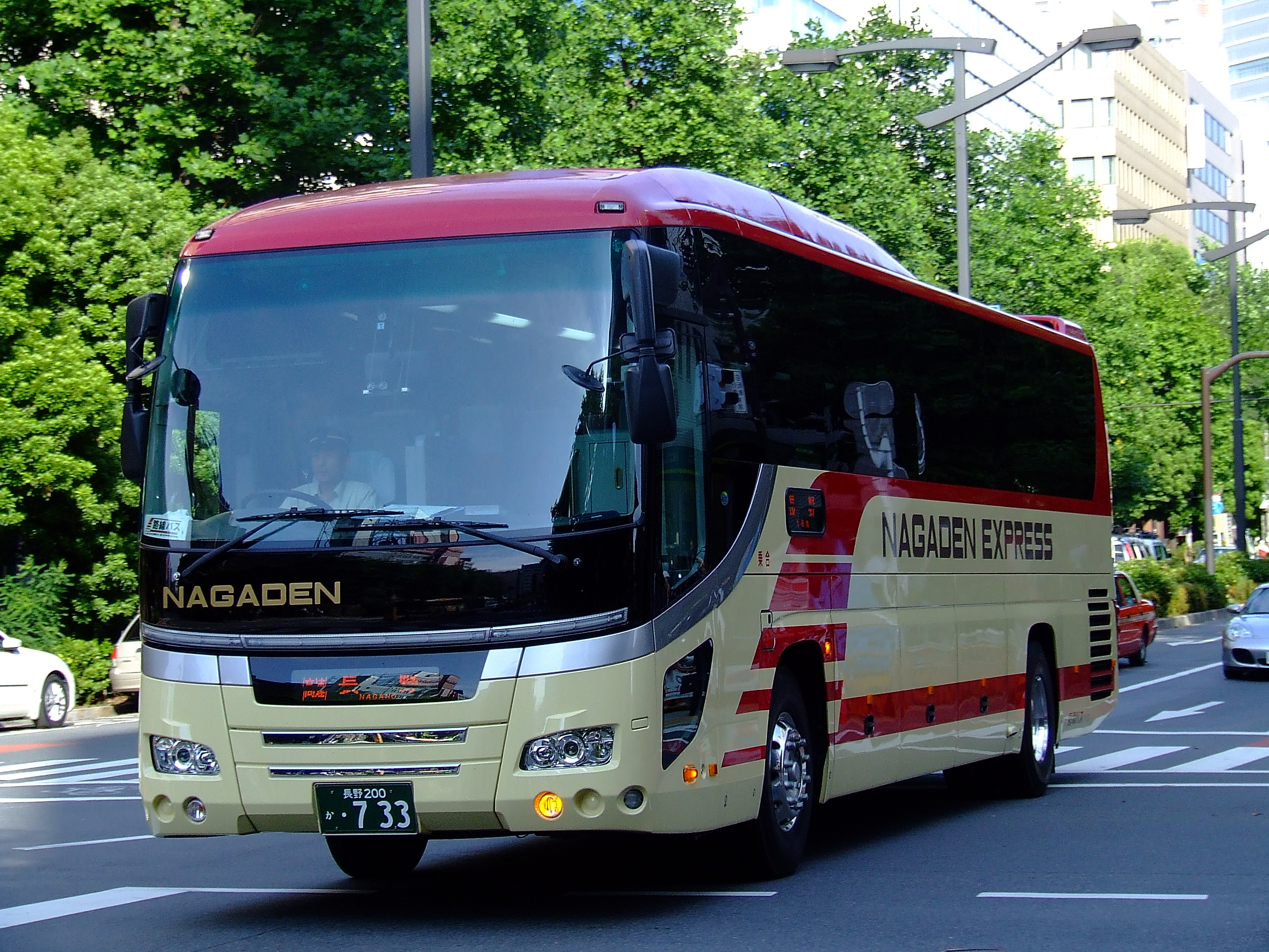 長電バスの高速バス東京（池袋）～長野（長野駅・柳原）線 池袋駅東口付近（「東口五差路」交差点）にて